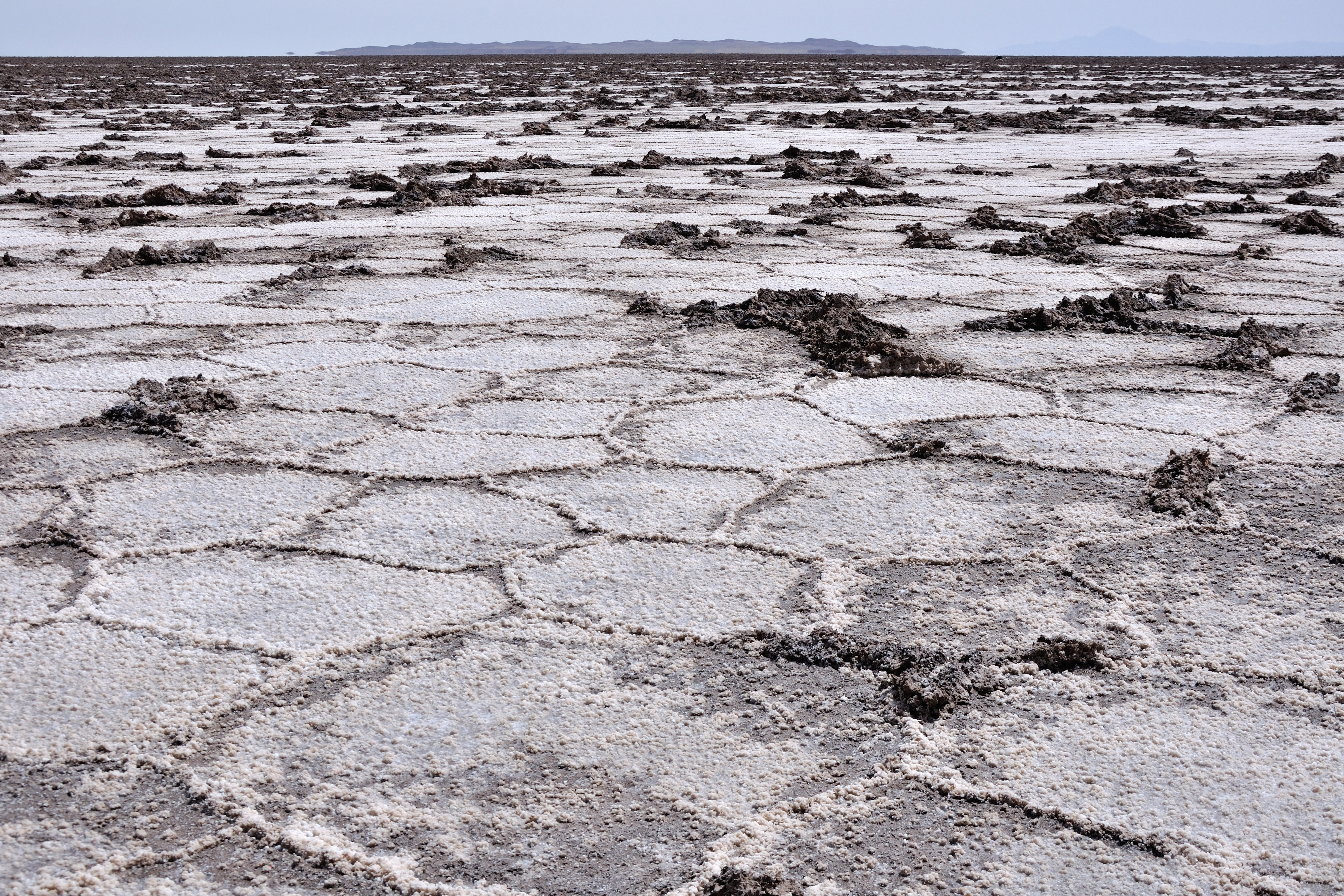 Iran, Namak Lake